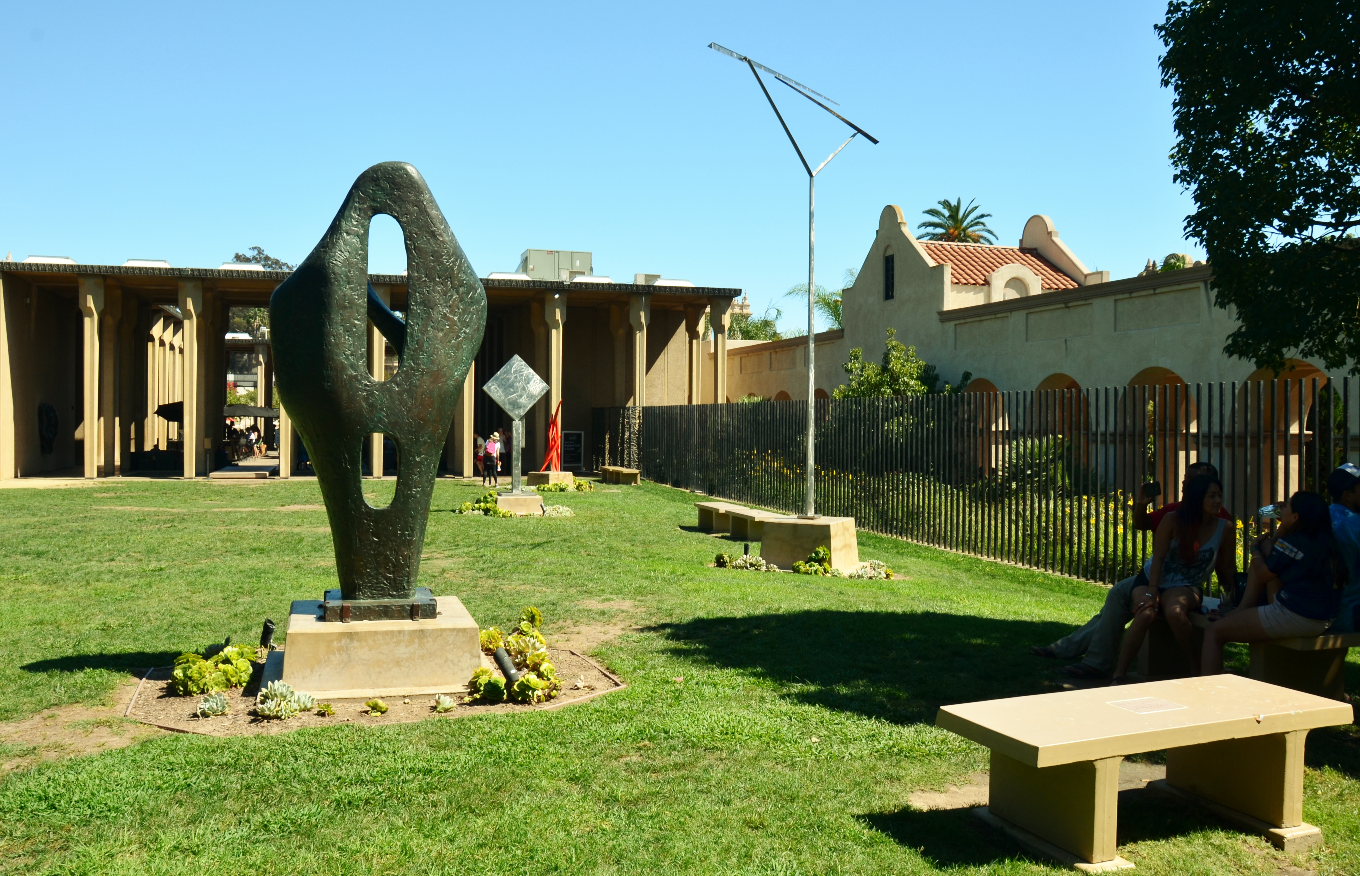 Balboa Park, San Diego, CA, USA